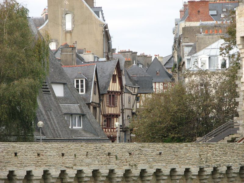 Toits - Vieille ville de Vannes (France)